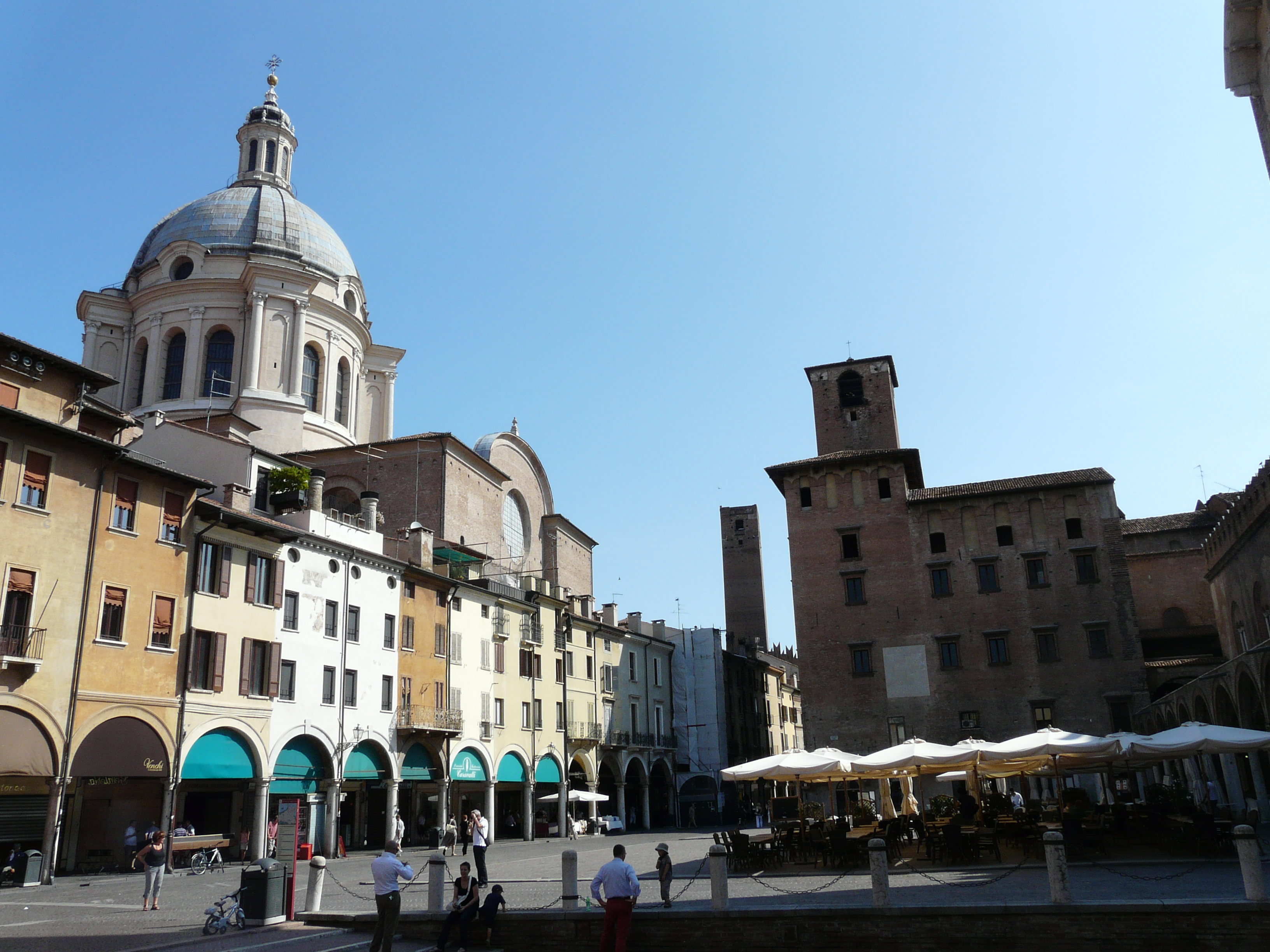 Piazza delle Erbe, Mantova, Lombardia, Italia